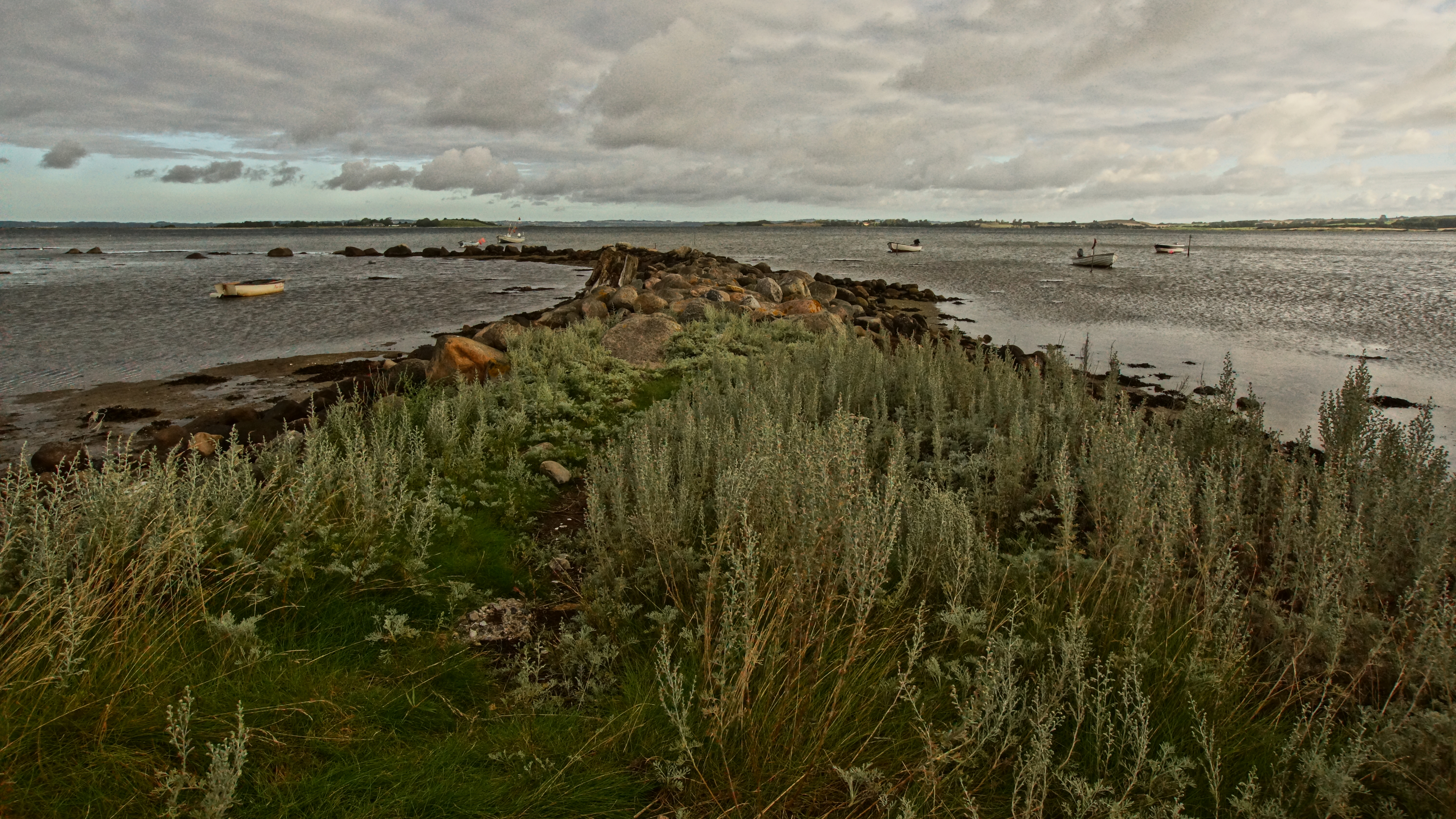 Tved Kær, udsigt over Knebel Vig, sydlige Djursland